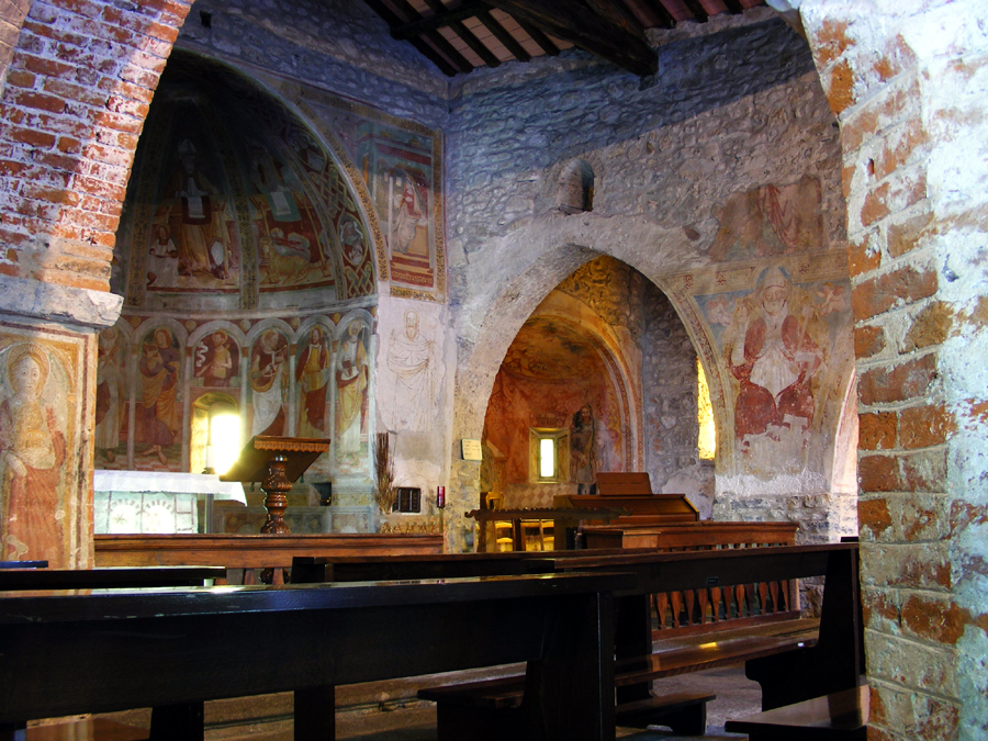 Chiesa di San Pietro, Gemonio, Varese, Italia.